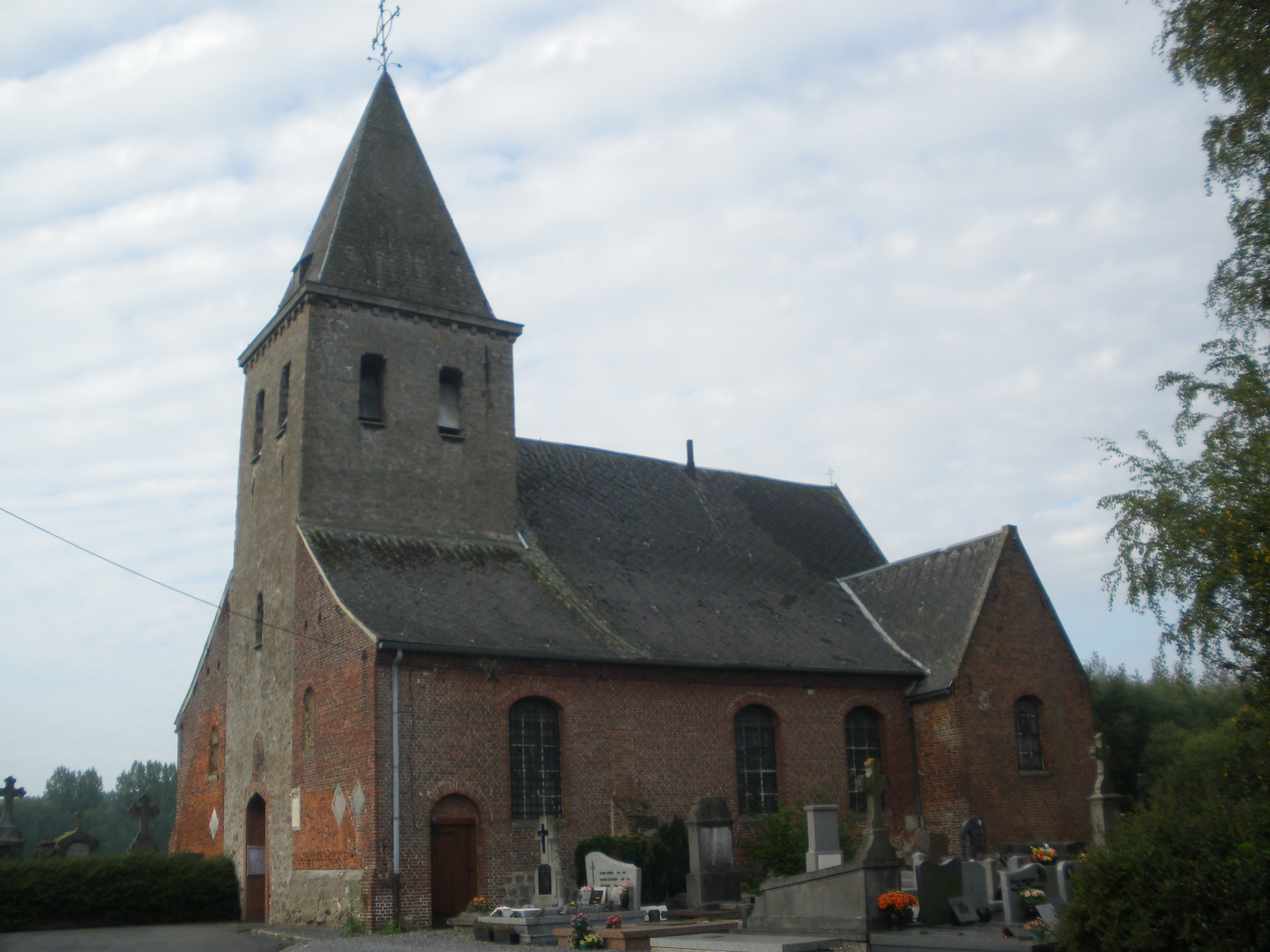 Vue de l'église Saint-Laurent d'Aix, dans le département du Nord.